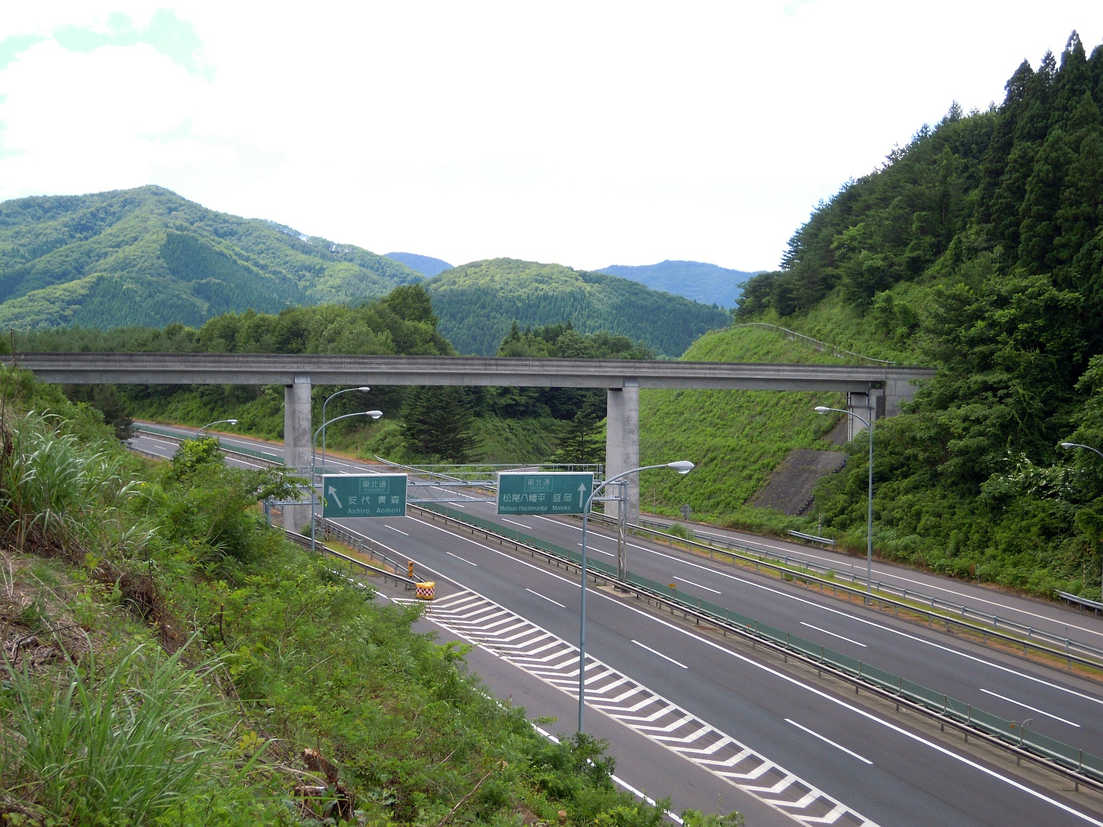 岩手県八幡平市にある安代ジャンクションを八戸方面から盛岡方面に向けて。中央を横断している跨道橋は、八幡平市道の七時雨橋。